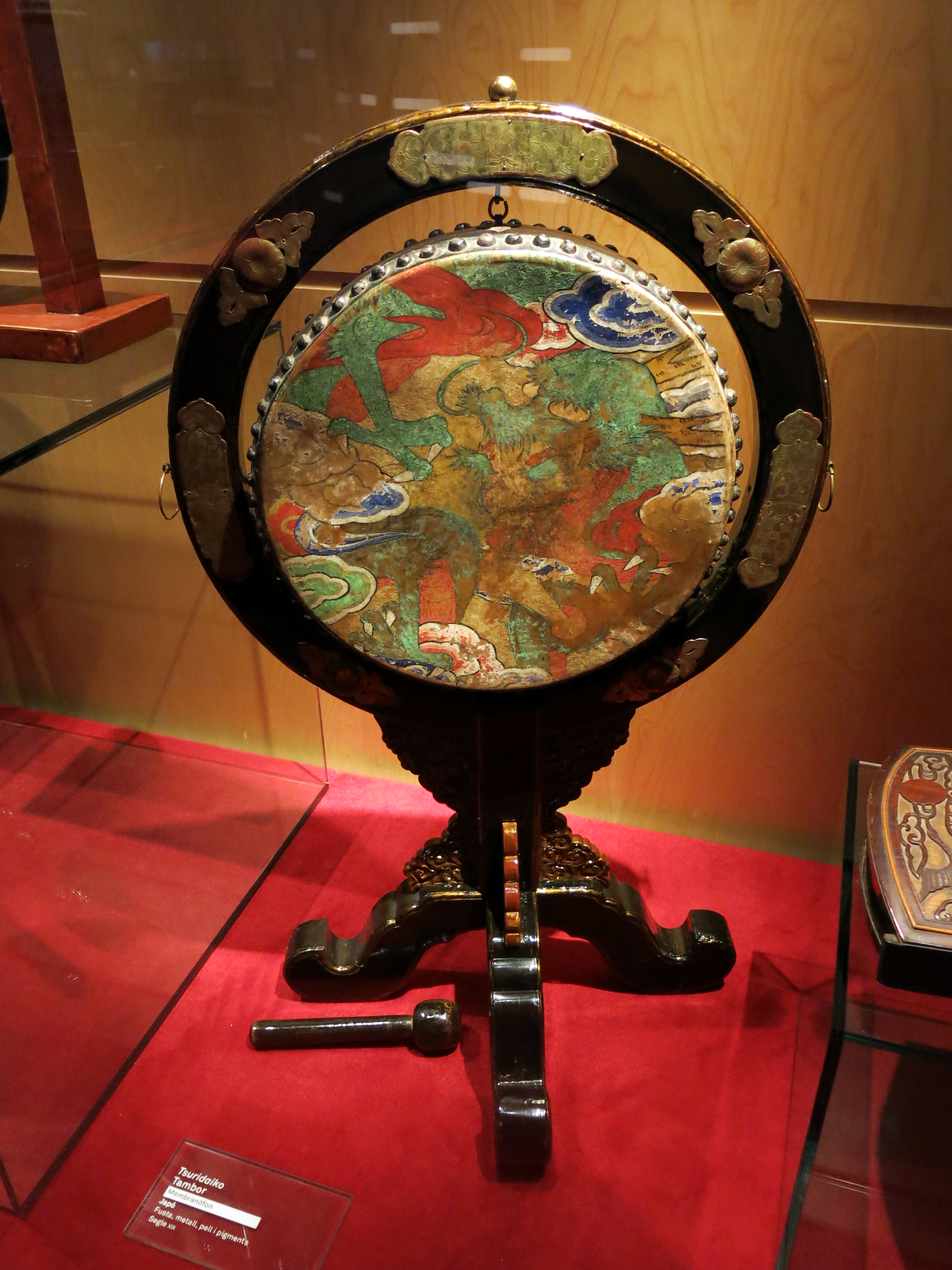 Tsuridaiko (drum), Japan, S. XIX. "Escultures musicals", exhibit.